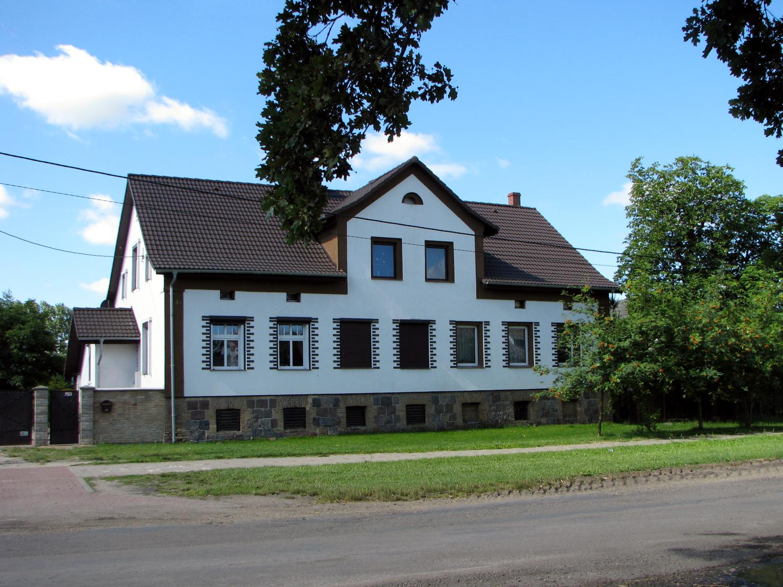 Wojcieszyce. Zabytkowy dom przy ul. Wspólnej